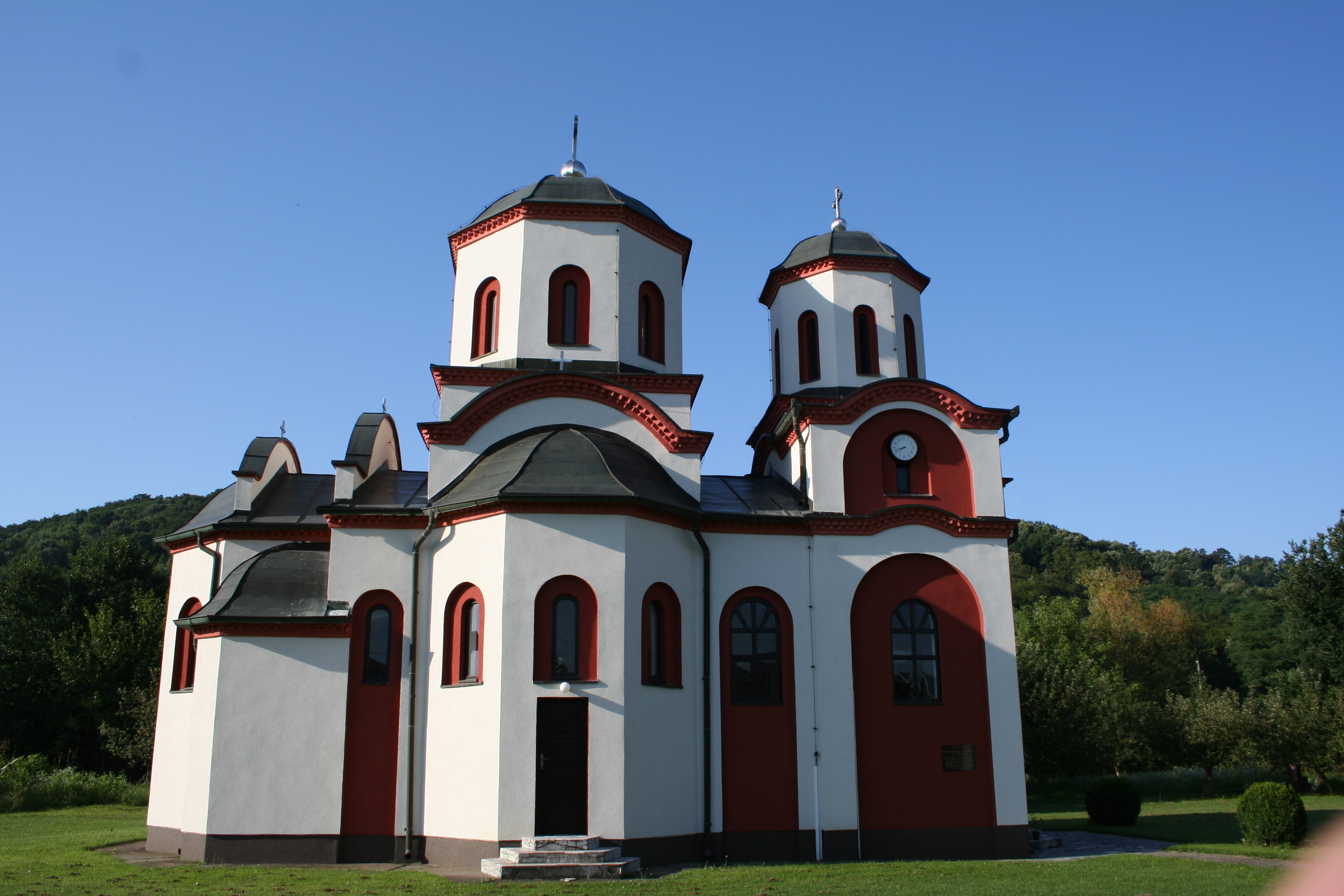 Crkva Vaskrsenja Gospodnjeg, Joševa